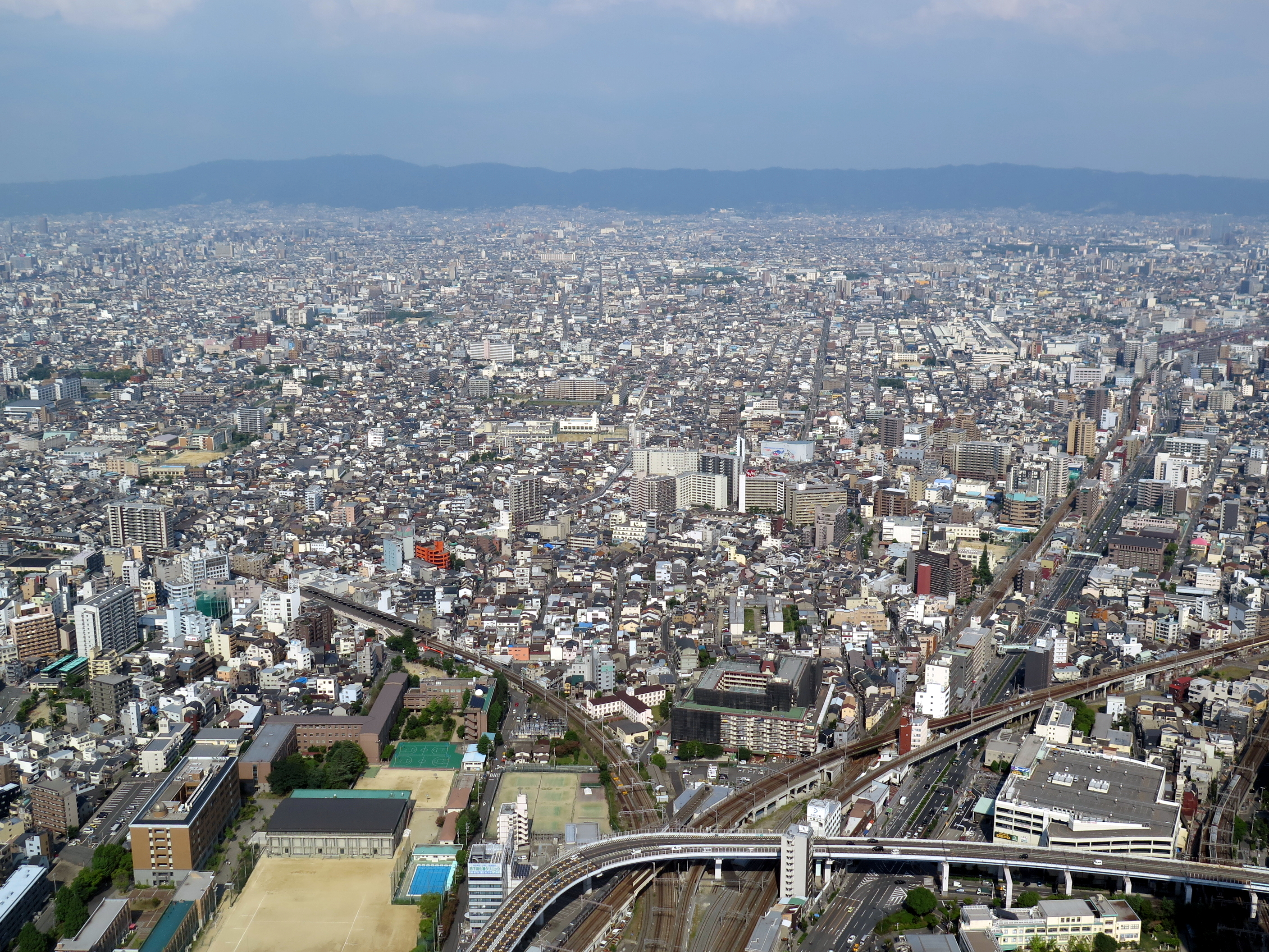 Ikuno-ku, Osaka